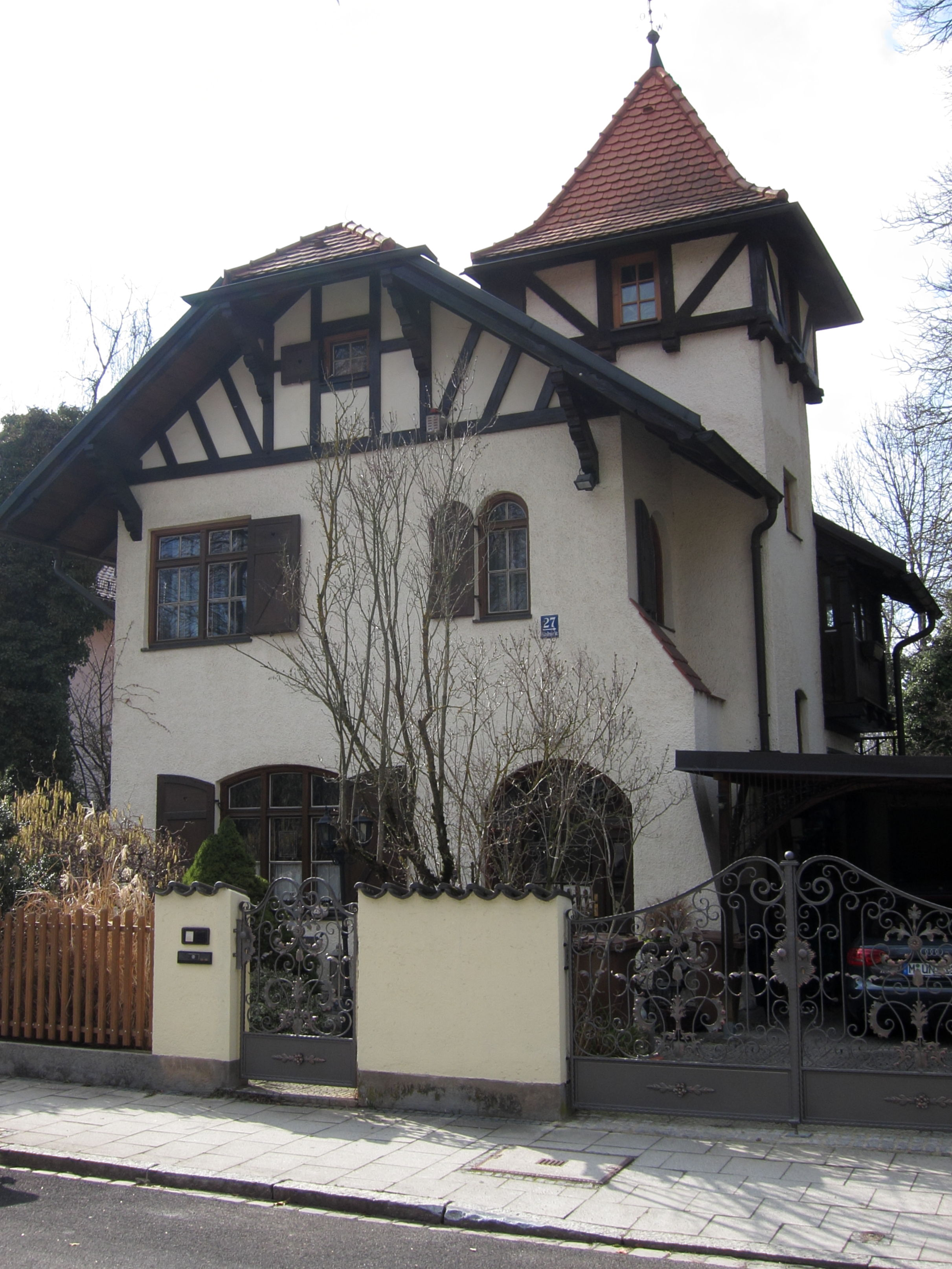 Fritz-Reuter-Straße 27; Malerische Fachwerkvilla, um 1893, aus dem Büro August Exter.